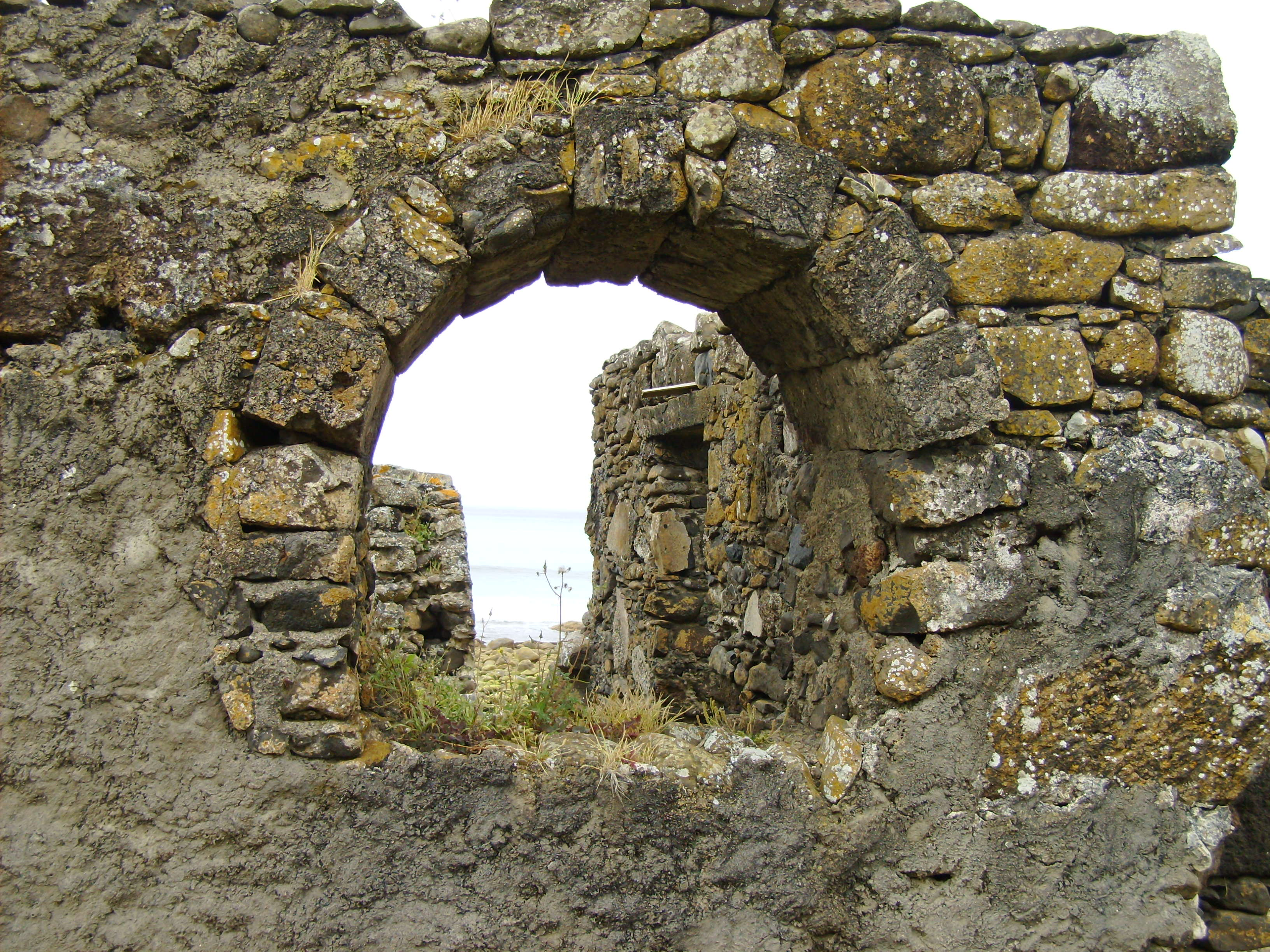 Forte de São João Baptista da Praia Formosa, Ilha de Santa Maria (Açores), Portugal.